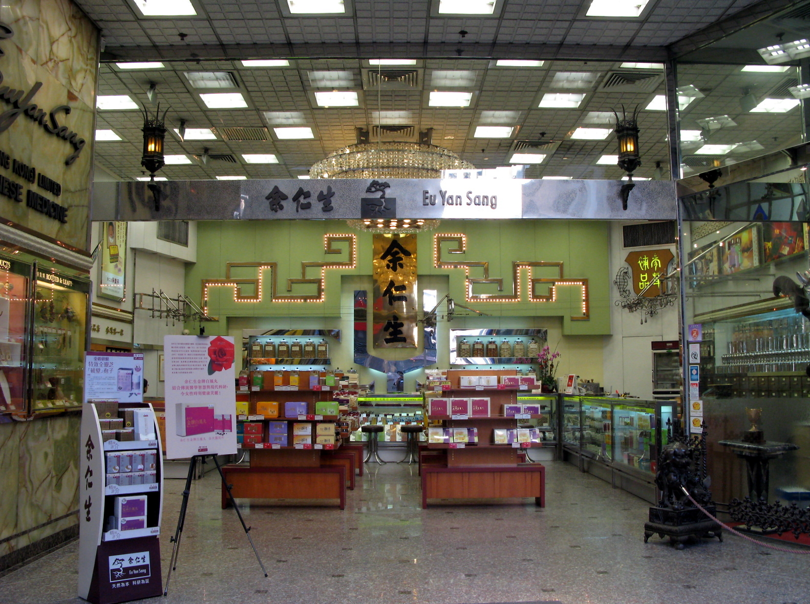 Eu Yan Sang Store in Central, Hong Kong